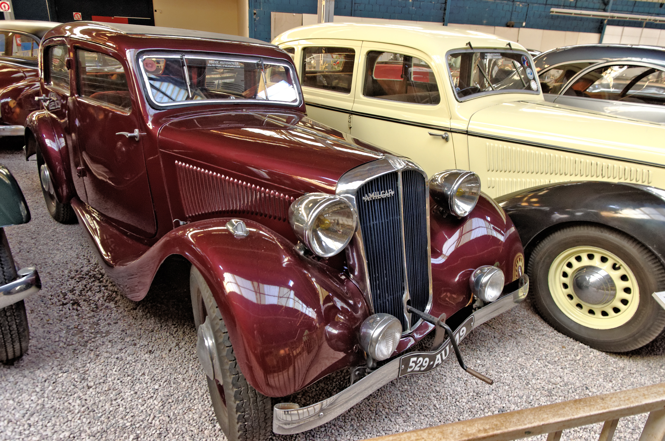 Amilcar Pégase (1935), Berline 4 places, 4 cyl. en ligne, culbuté, 2150 cm3, 48 ch., vitesse max. 125 km/h (Musée Automobile Reims Champagne, Reims, Marne, France)